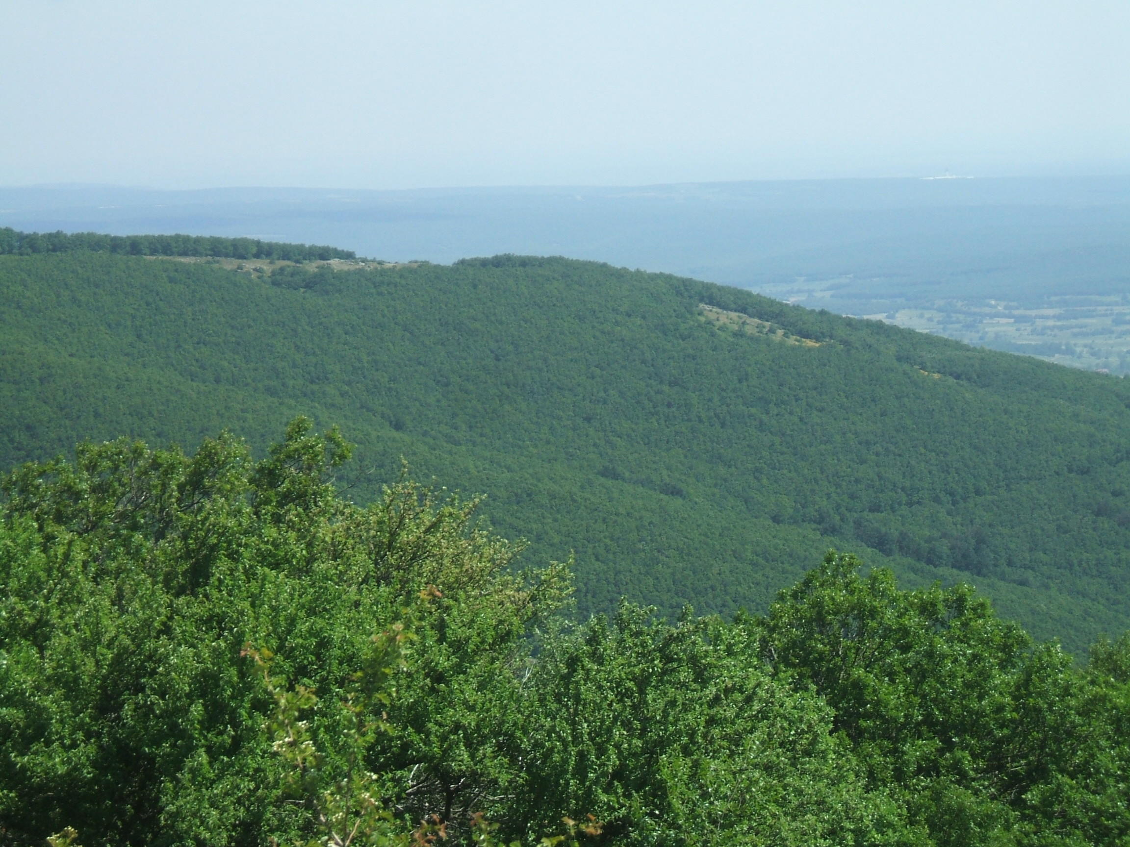 Istranca Ormanları